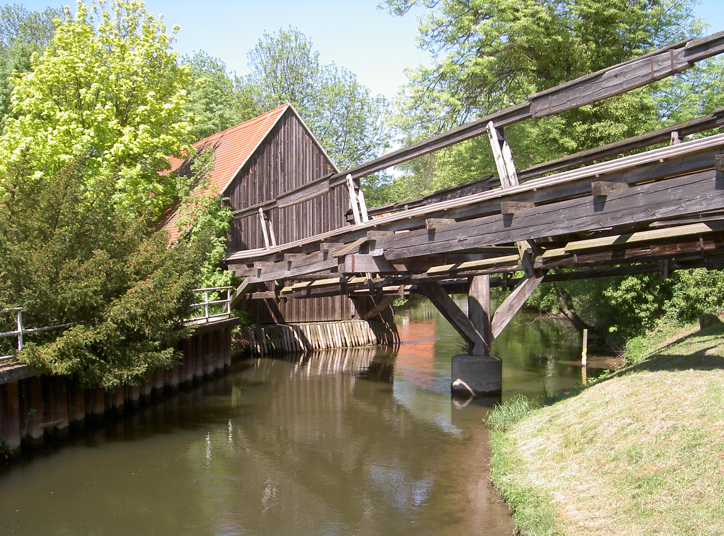 Bad Kösen, Radhaus (Schutzgebäude für das Wasserrad) mit Beginn des Kunstgestänges. Radinsel in der Saale